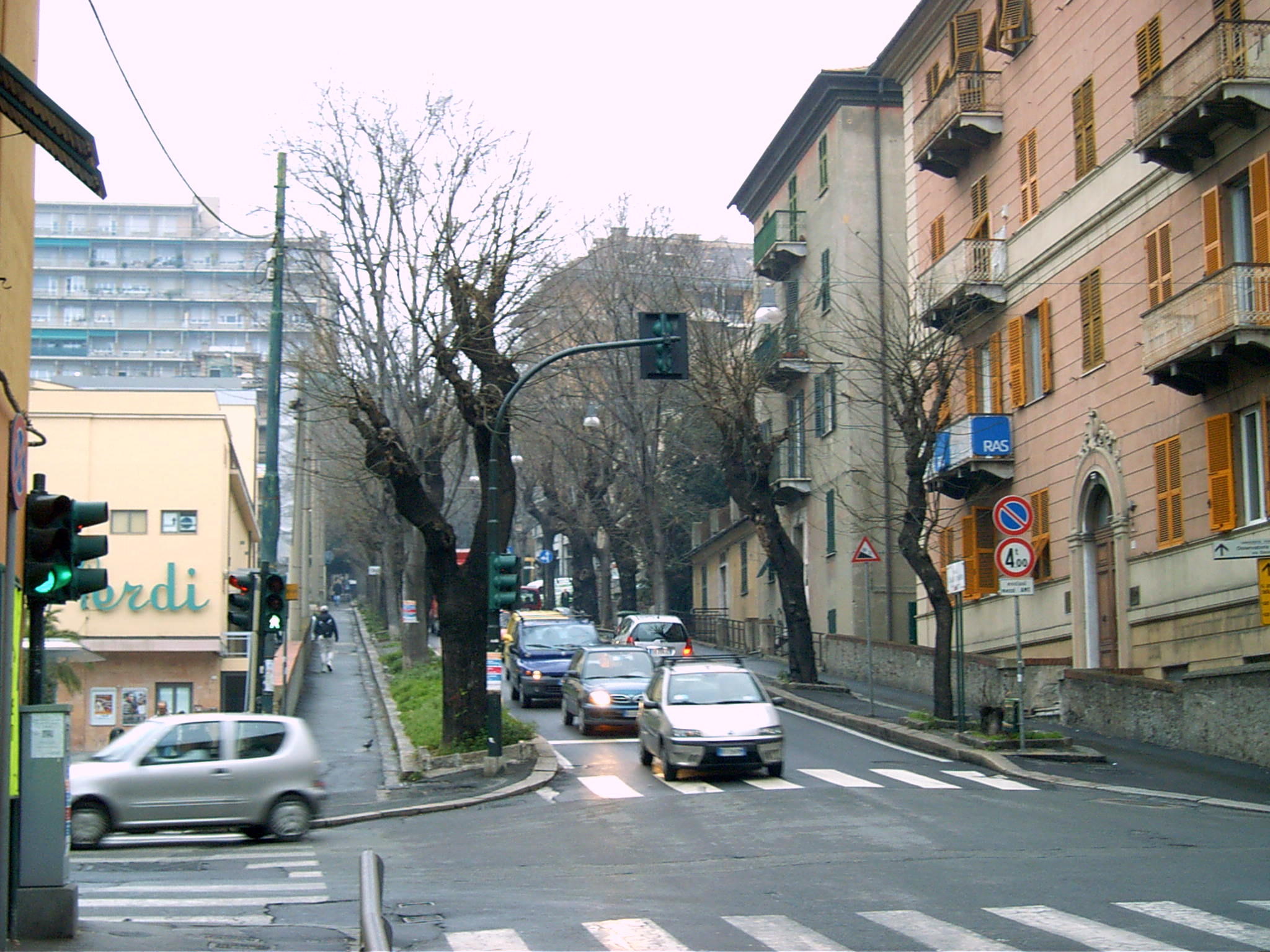 Viale Carlo Canepa, Sestri Ponente, Genova